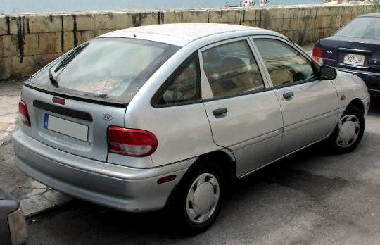 Kia Avella